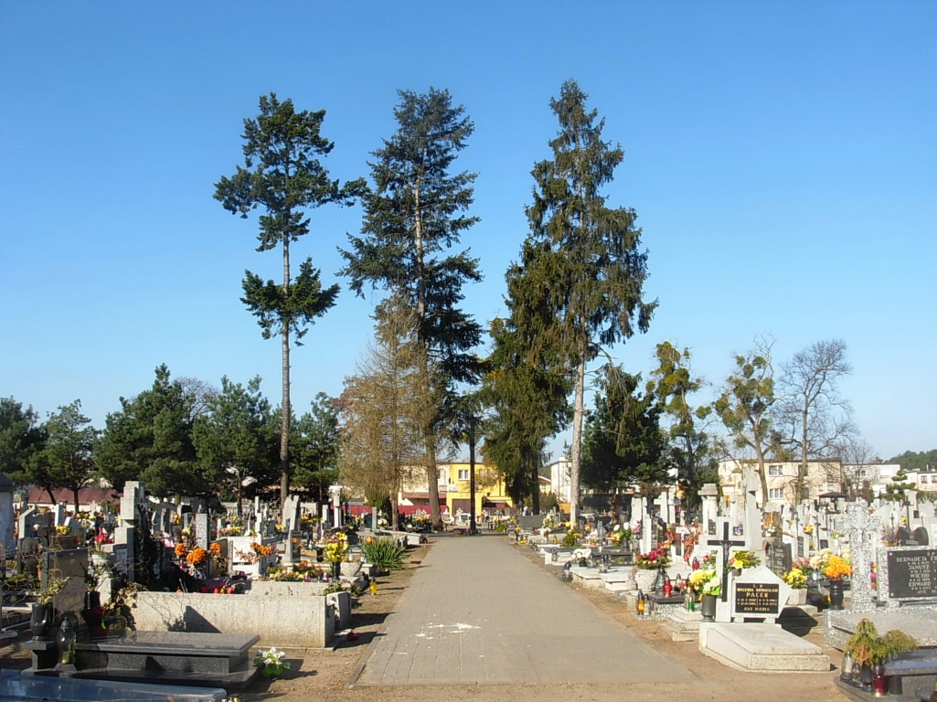 Cmentarz parafialny katolicki św. Antoniego przy ul. Podniebnej w Bydgoszczy-Czyżkówku